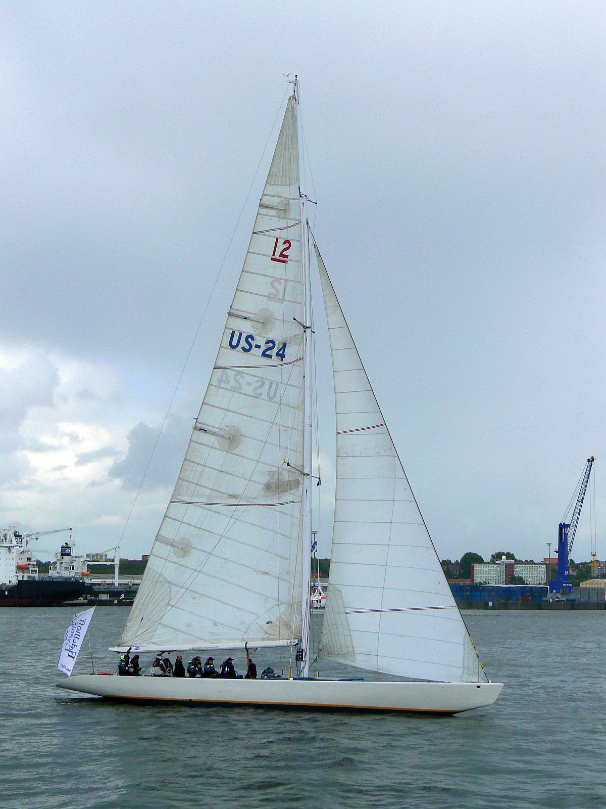 12mR Yacht Valiant (Bj. 1928) bei der Kieler Woche 2009.